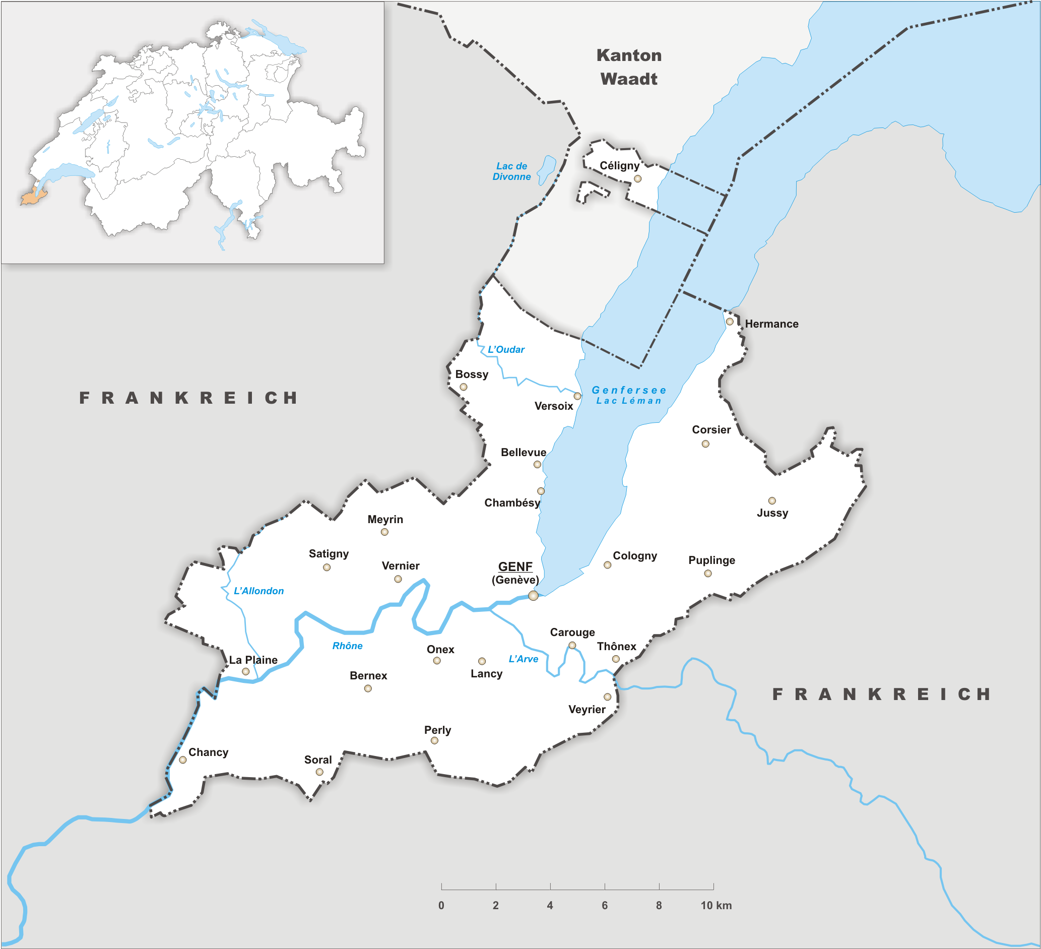 Karte des Kanton Genf.